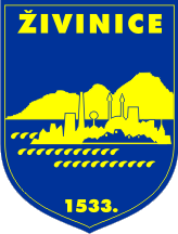 Wappen von Živinice (in Bosnien und Herzegowina)